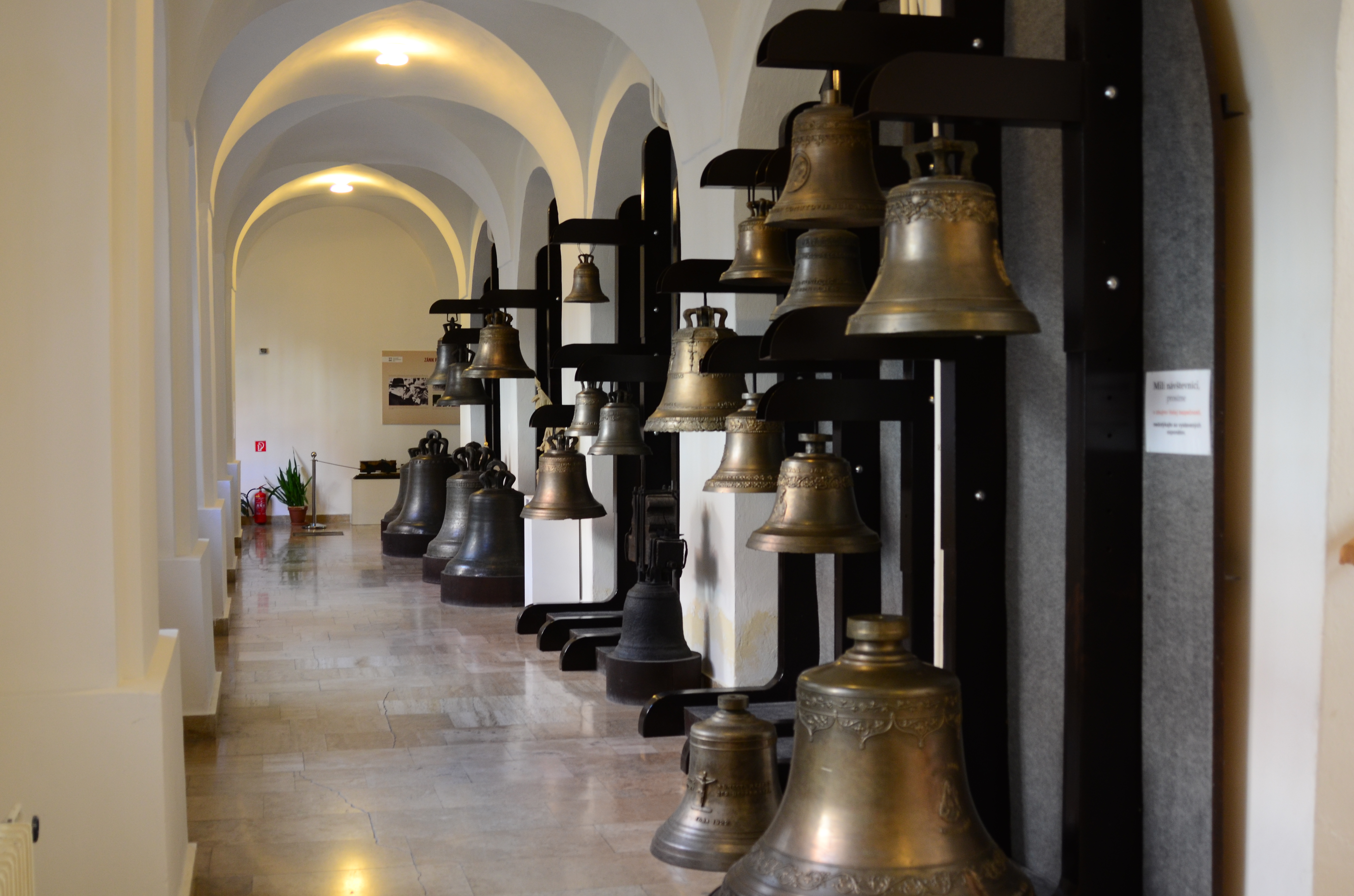 Campanologische Sammlung im Stadtmuseum Trnava